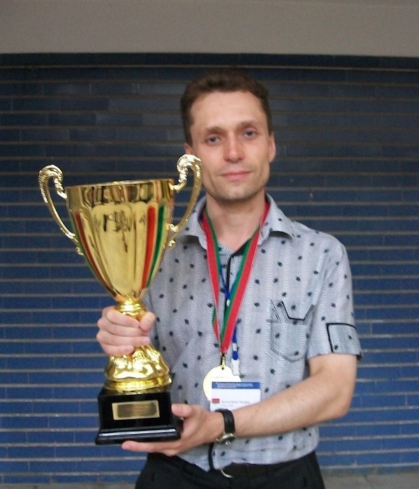 Сергей Корчицкий стал чемпионом Европы по сёги в 2013 году